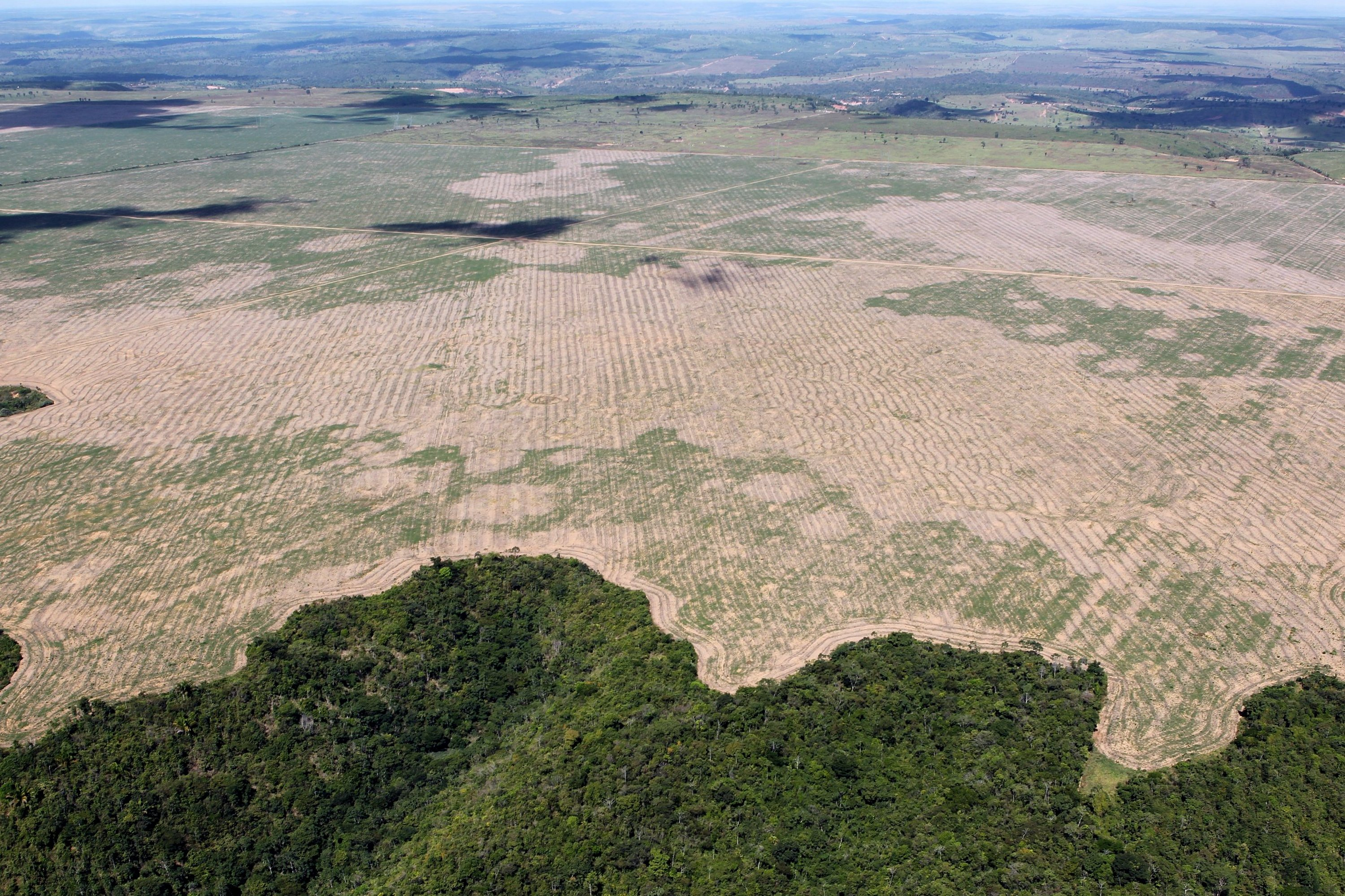 Ibama e Polícia Federal combatem grupo criminoso responsável por extrair e comercializar ilegalmente madeira da Reserva Biológica do Gurupi e das Terras Indígenas Caru e Alto Turiaçu, no Maranhão. Foto: Felipe Werneck - Ascom/Ibama